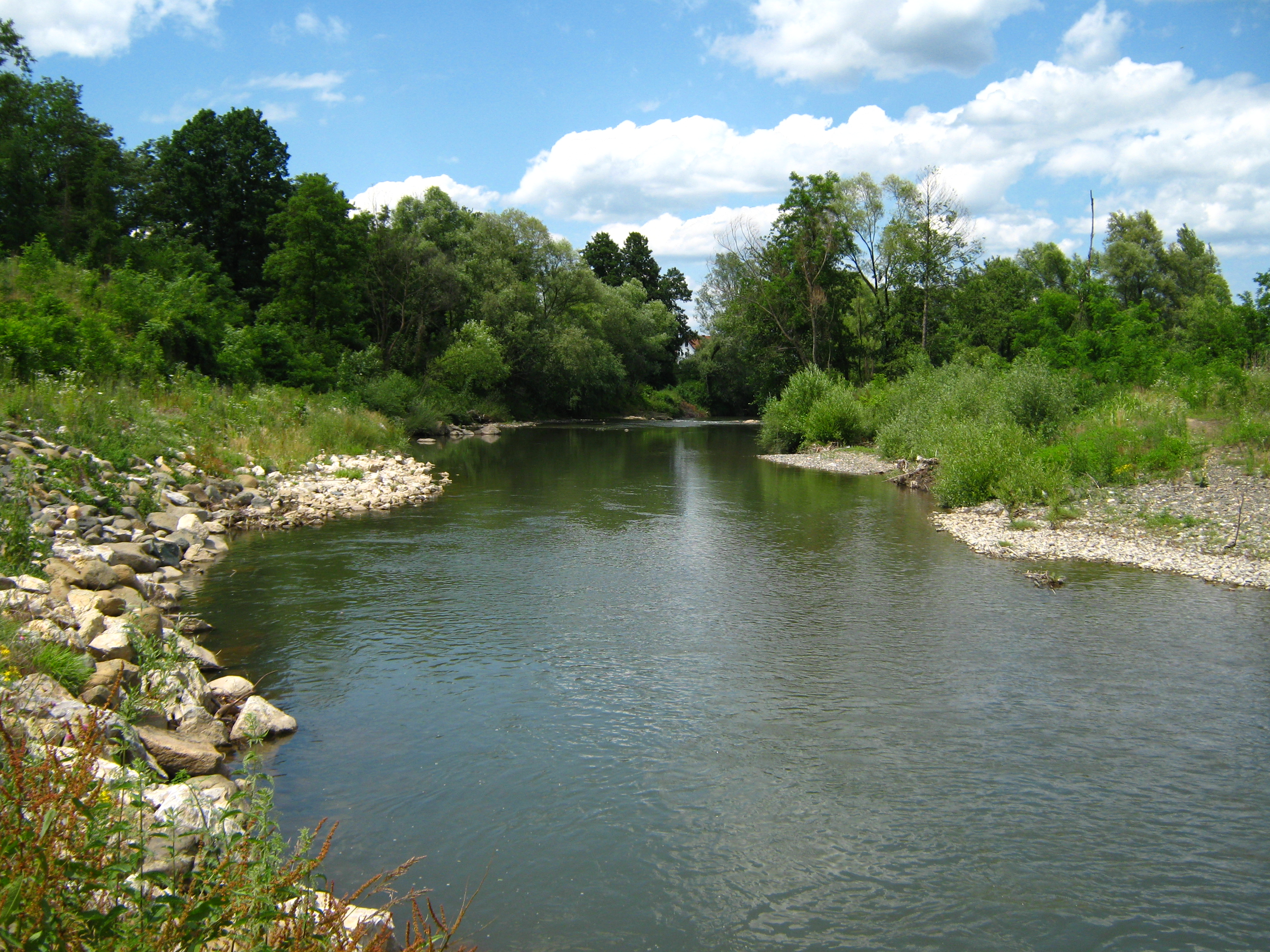 Аутор: ја лично.